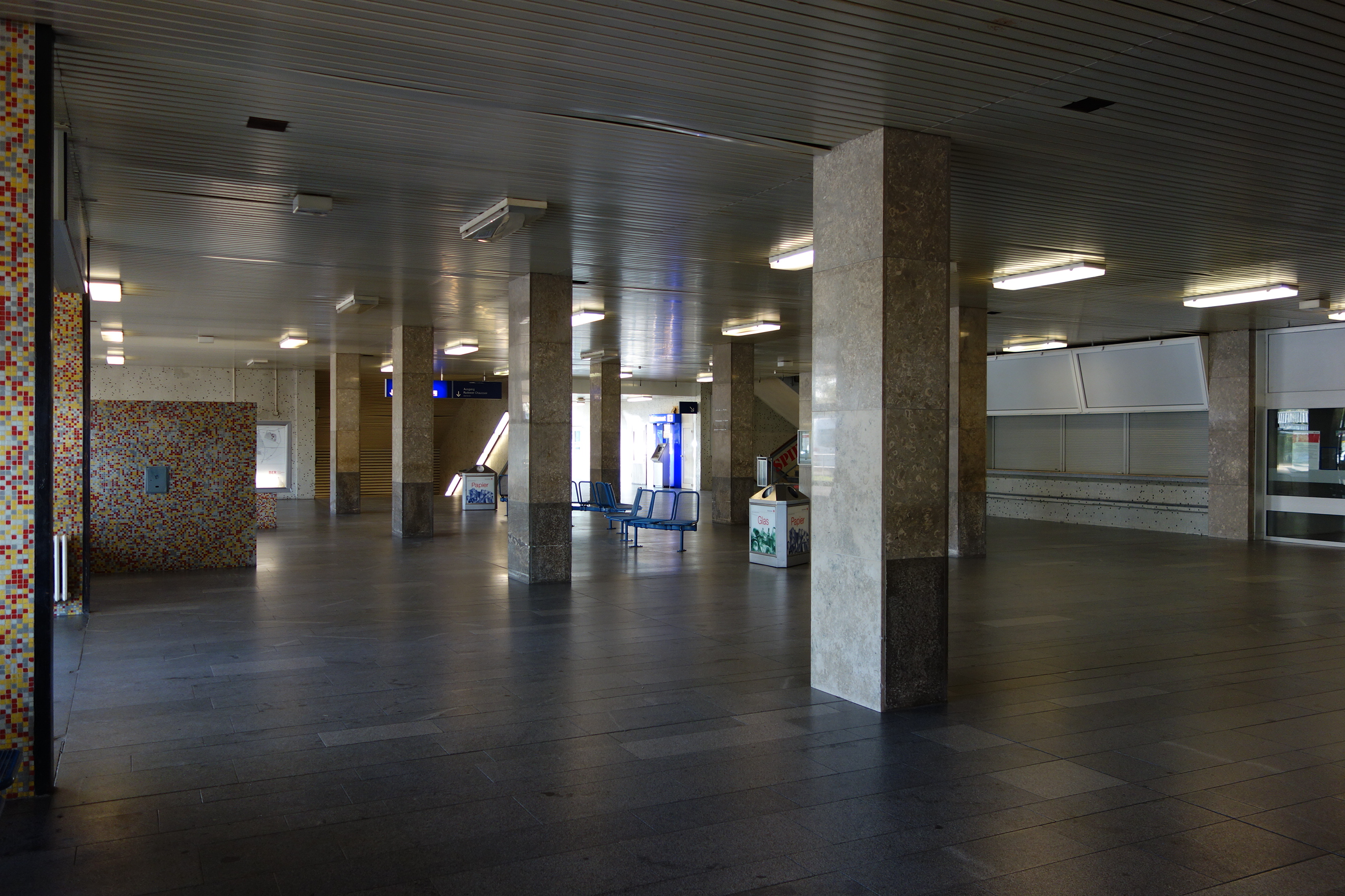 Bahnhof Berlin-Schönefeld Flughafen, Empfangsgebäude Eingangshalle